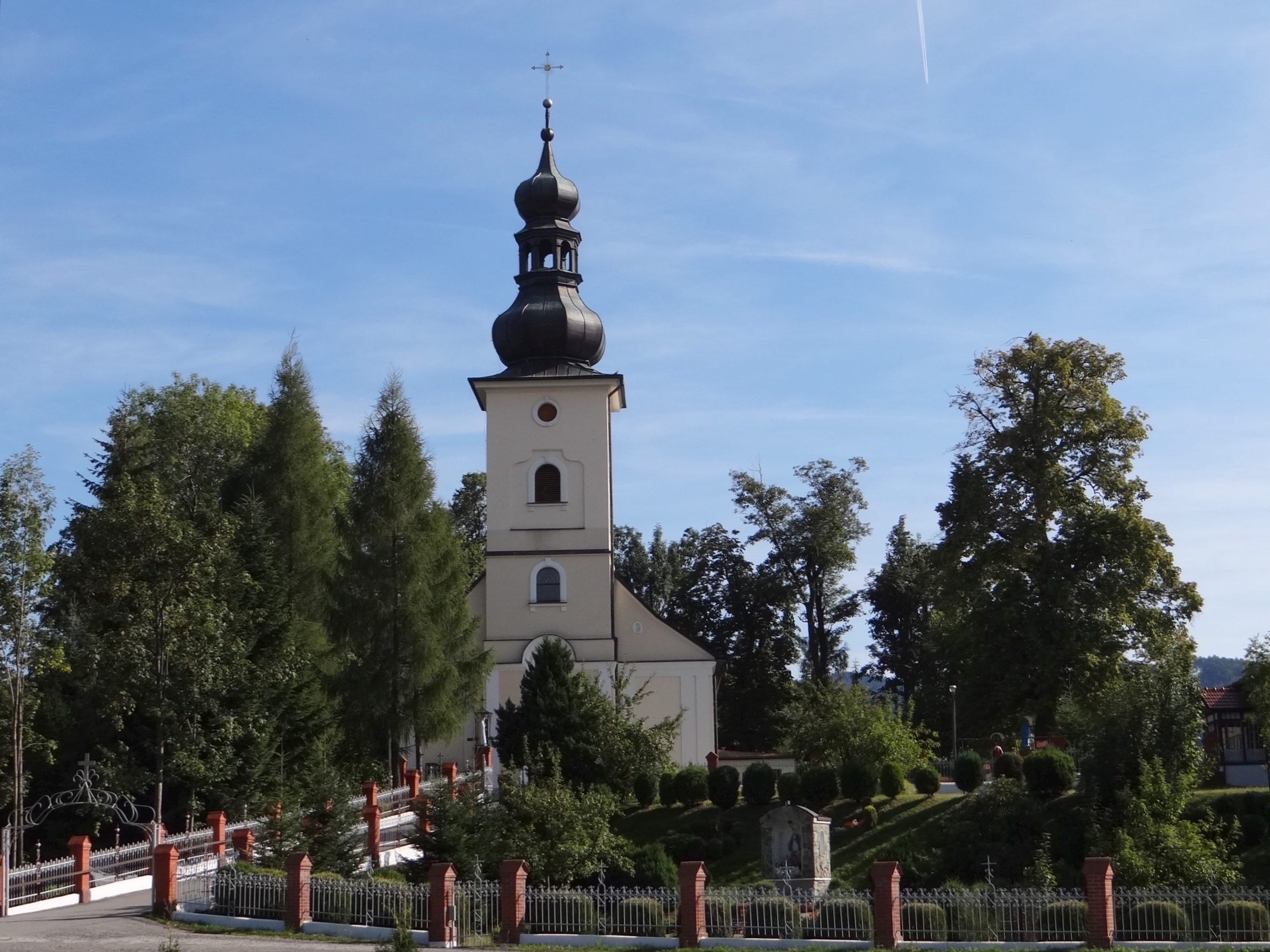 Kościół w Rzykach